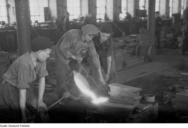 Original image description from the Deutsche FotothekPortrait von drei Gießern